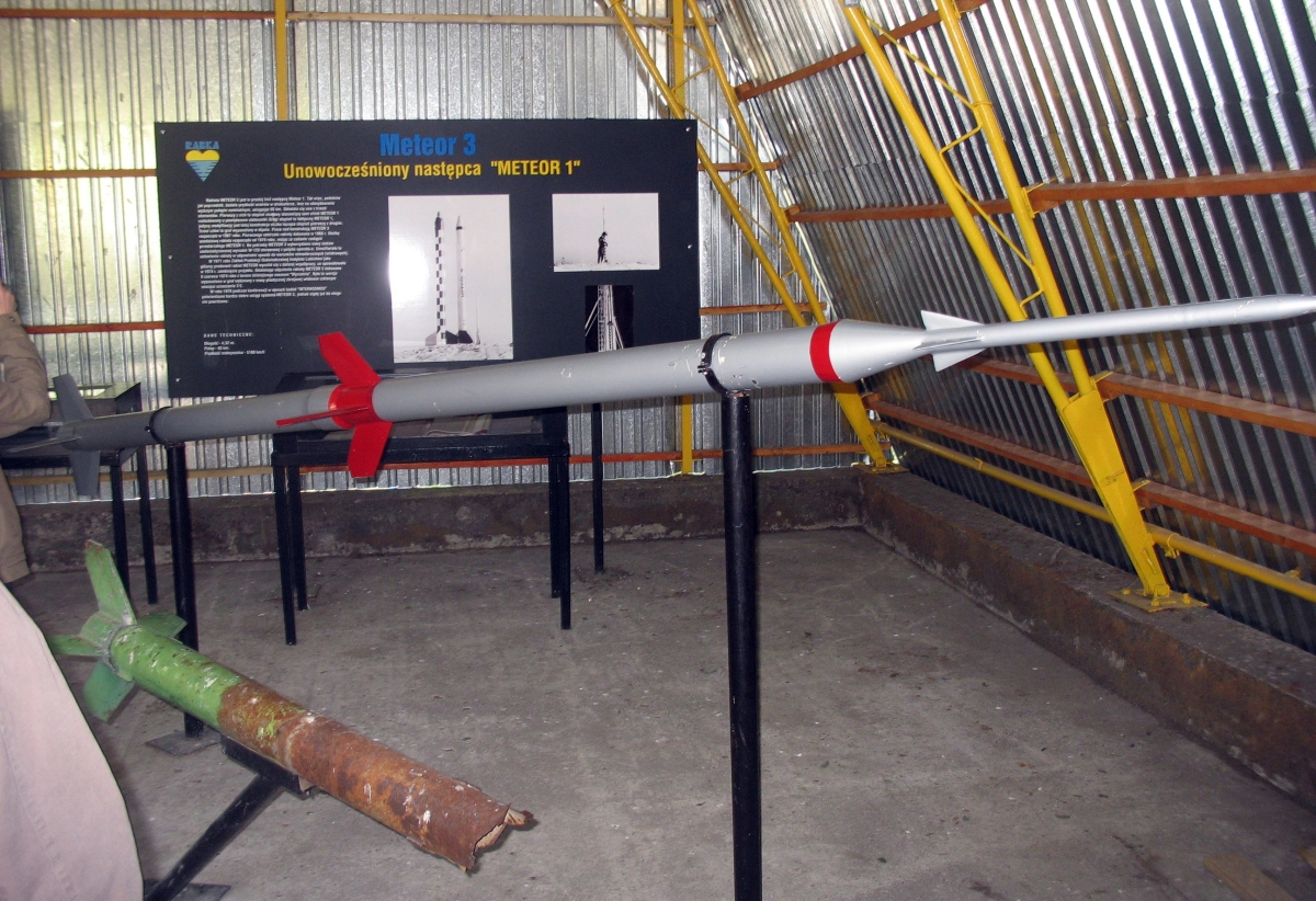 Rekonstrukcja rakiety Meteor 3 z poligonu pod Łebą (obecnie muzeum)